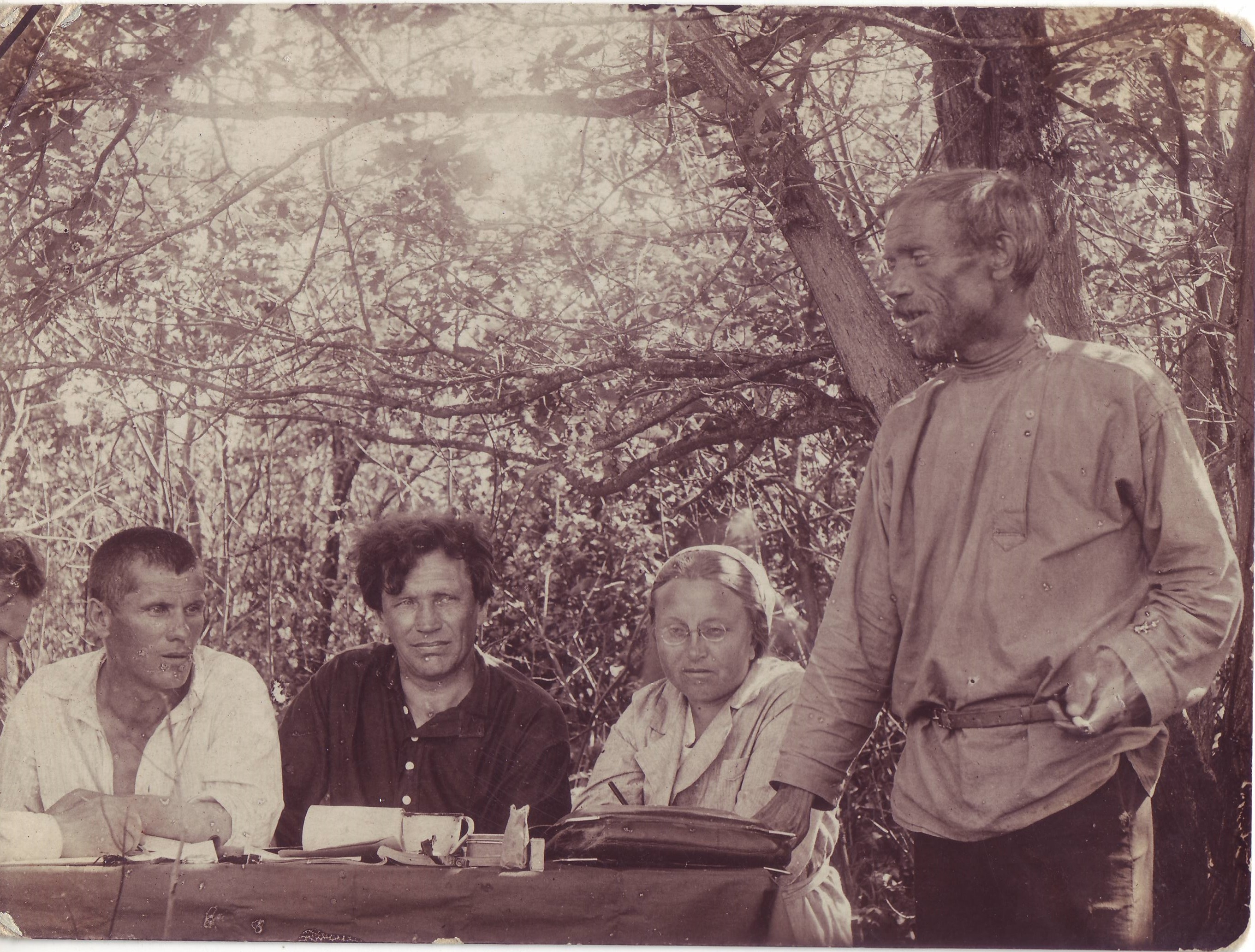 Иван Федорович Родигин 1896-1942 Собрание артели